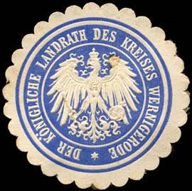 Sealing stamp Title: Der Königliche Landrath des Kreises Wernigerode Description: blau, weiß, geprägt Place: Wernigerode size: 4 cm